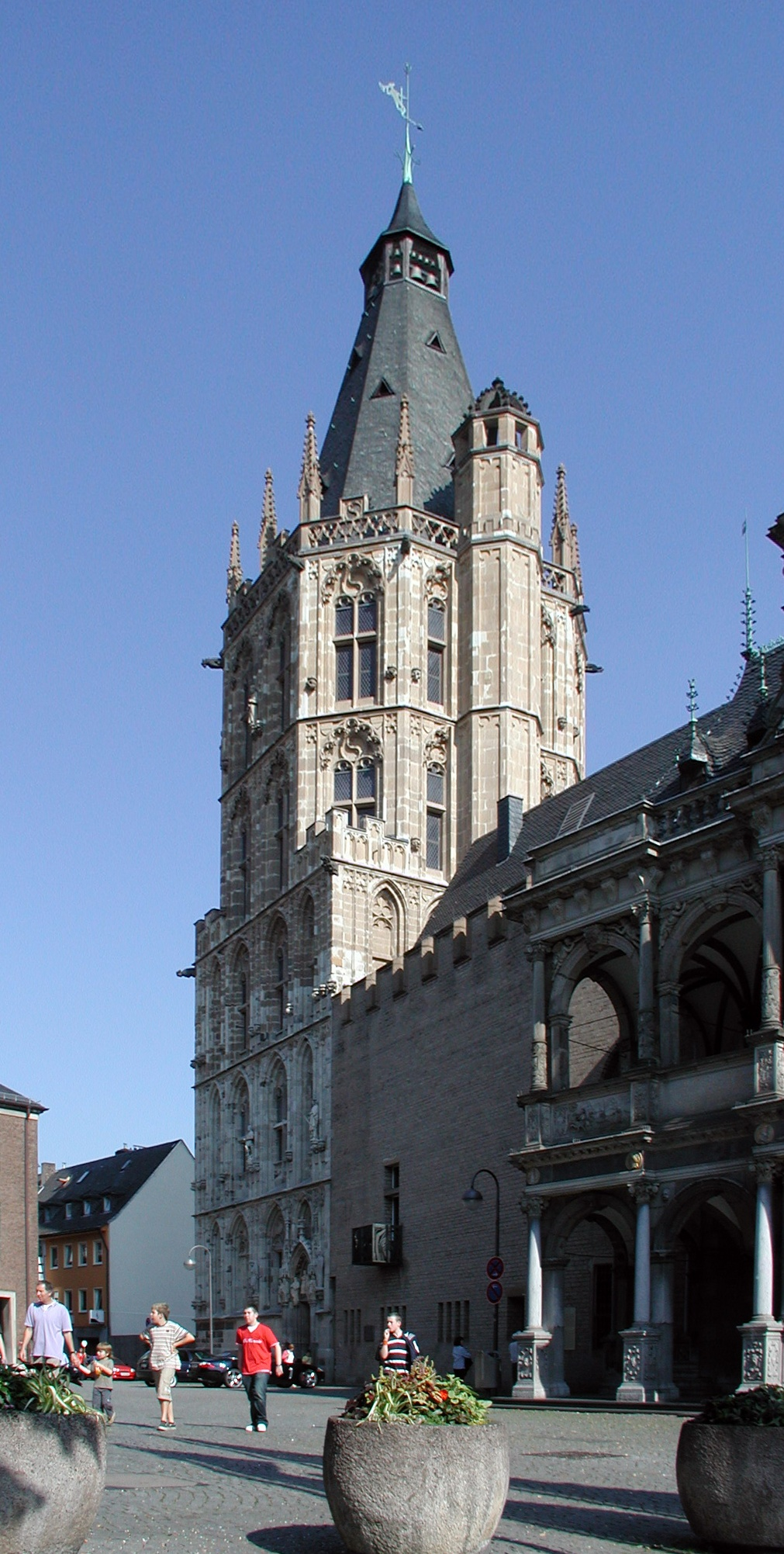 Köln-Altstadt, Rathausturm ohne Figuren.